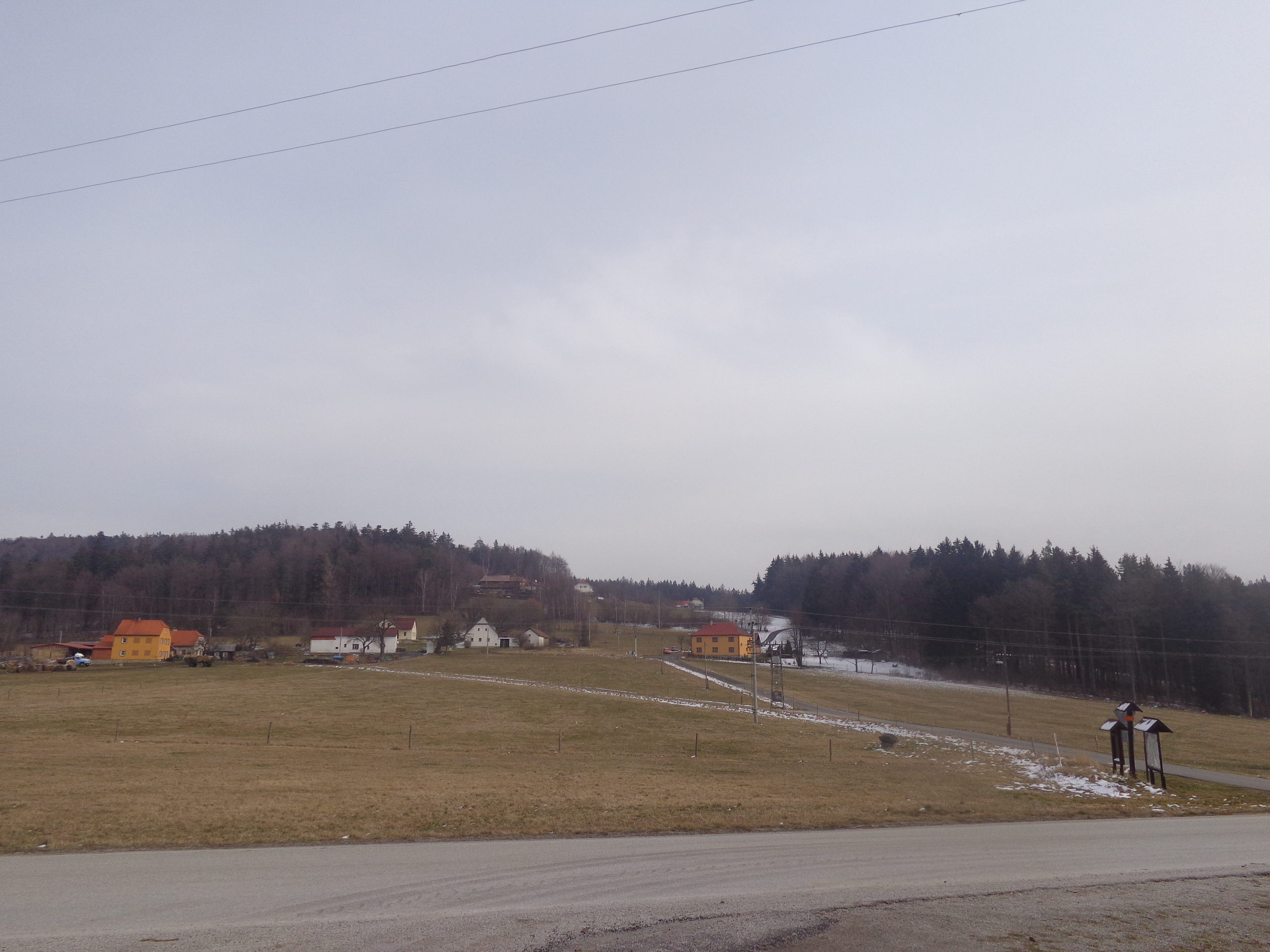 osada Rohy (obec Brloh, okres Český Krumlov)